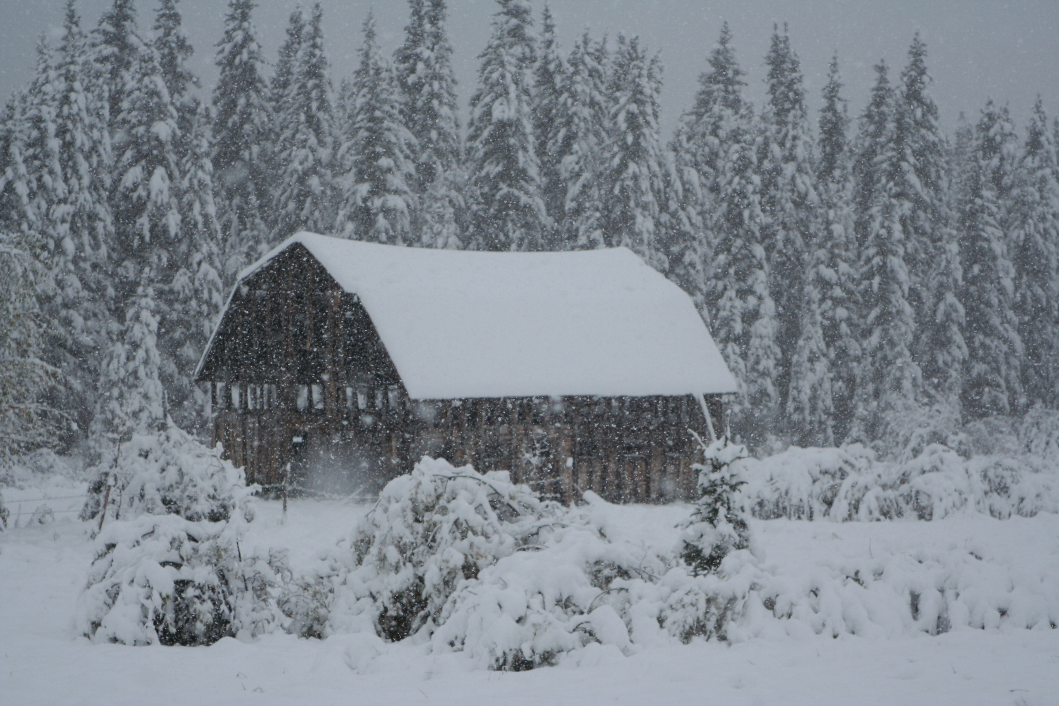 barn at Embarras Landing, Alberta